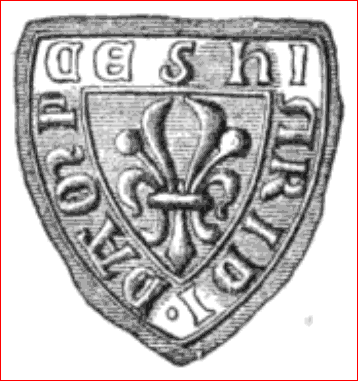 Siegel des Hinrik Kampzen (Heinrich von Kamptz) an einer Urkunde vom 7. Juni 1356 anlässlich eines Friedensschlusses seiner Lehensherren der Fürsten von Werle(u.a. Bernhard von Werle) mit den Herzogen von Mecklenburg Albrecht und Johann. Verzeichnet und gedruckt bei: Carl Gustav Immanuel von Kamptz: Die Familie von Kamptz. Bärensprungsche Hofdruckerei, Schwerin 1871. S. 43